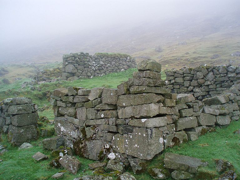 Føroyskt: Húsatoftir á Skálatoftum